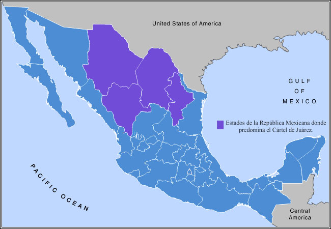 Mapa donde se muestra las zonas de predominio principales del Cártel de Juárez.